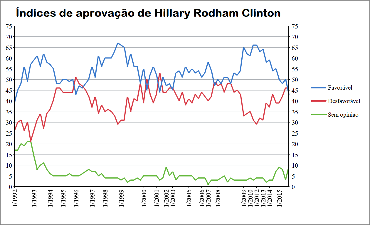 Índices de aprovação de Hillary Rodham Clinton, segundo pesquisas da Gallup.